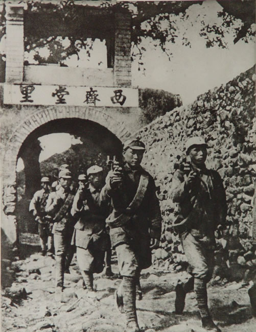 1939年，冀热察挺进军到达平西，收复西斋堂里